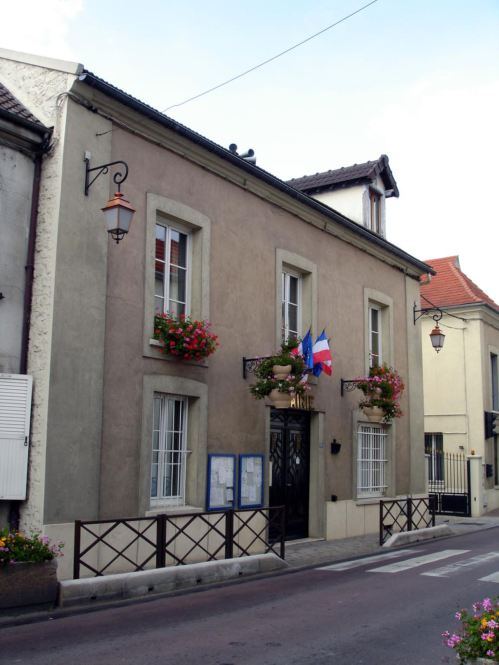 Mairie de Bonneuil-en-France (Val-d'Oise), France